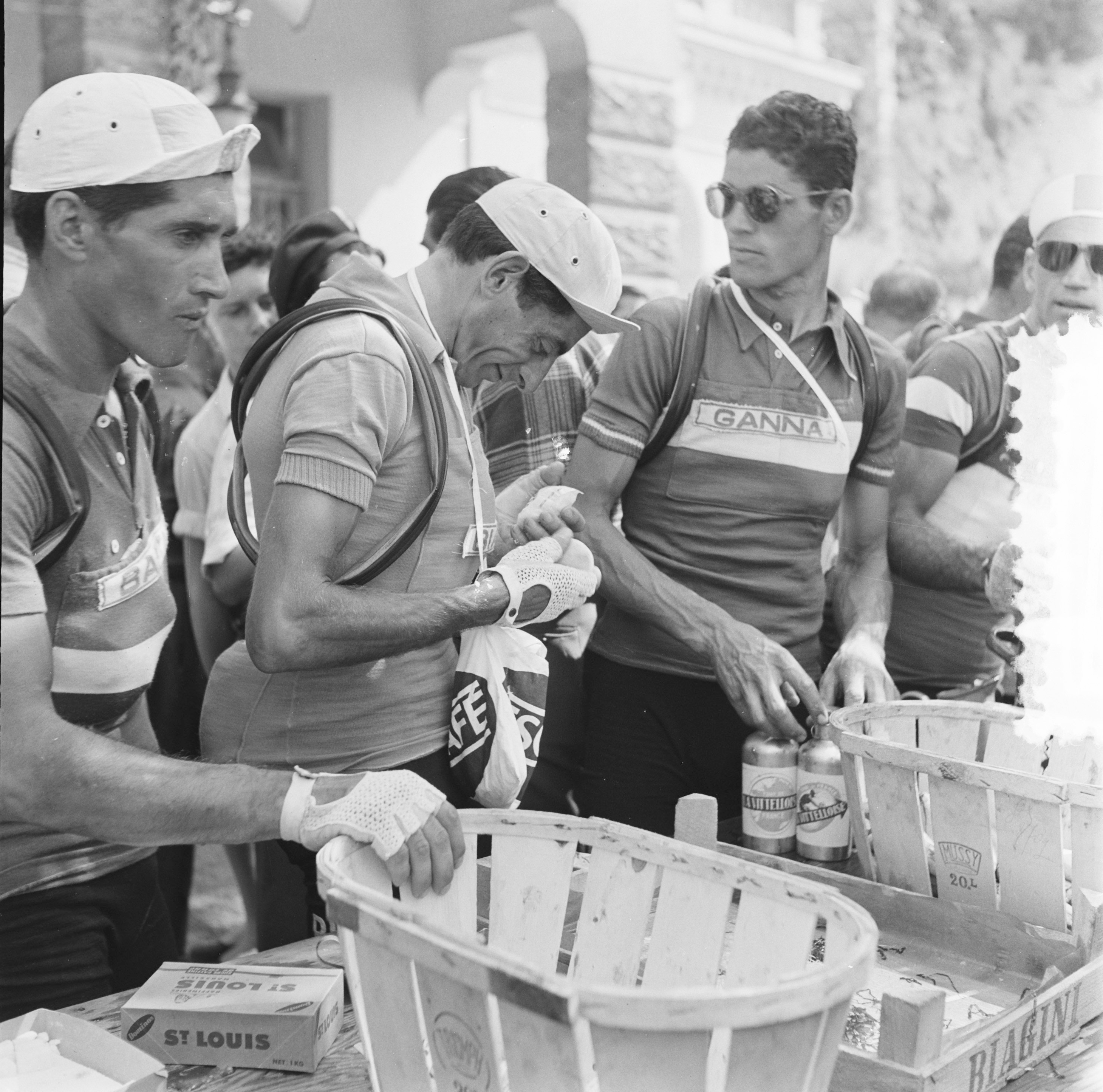 Nationaal Archief Beschrijving: Fausto Coppi eet een sinaasappel (links: Giovanni Corrieri, rechts Baroni en Magni) Datum: 18 juli 1952 Bestanddeelnummer 905-2267 Vervaardiger: Anefo/ Presser URL: Voor meer informatie over het Nationaal Archief: Voor meer foto's uit deze en andere collecties, bezoek onze Beeldbank:, U kunt ons helpen onze kennis van de fotocollecties te verrijken door tags en commentaren toe te voegen. Herkent u mensen of locaties of heeft u een bijzonder verhaal te vertellen bij één van de foto's, laat dan een reactie achter (als u ingelogd bent bij Flickr) of stuur een mailtje naar